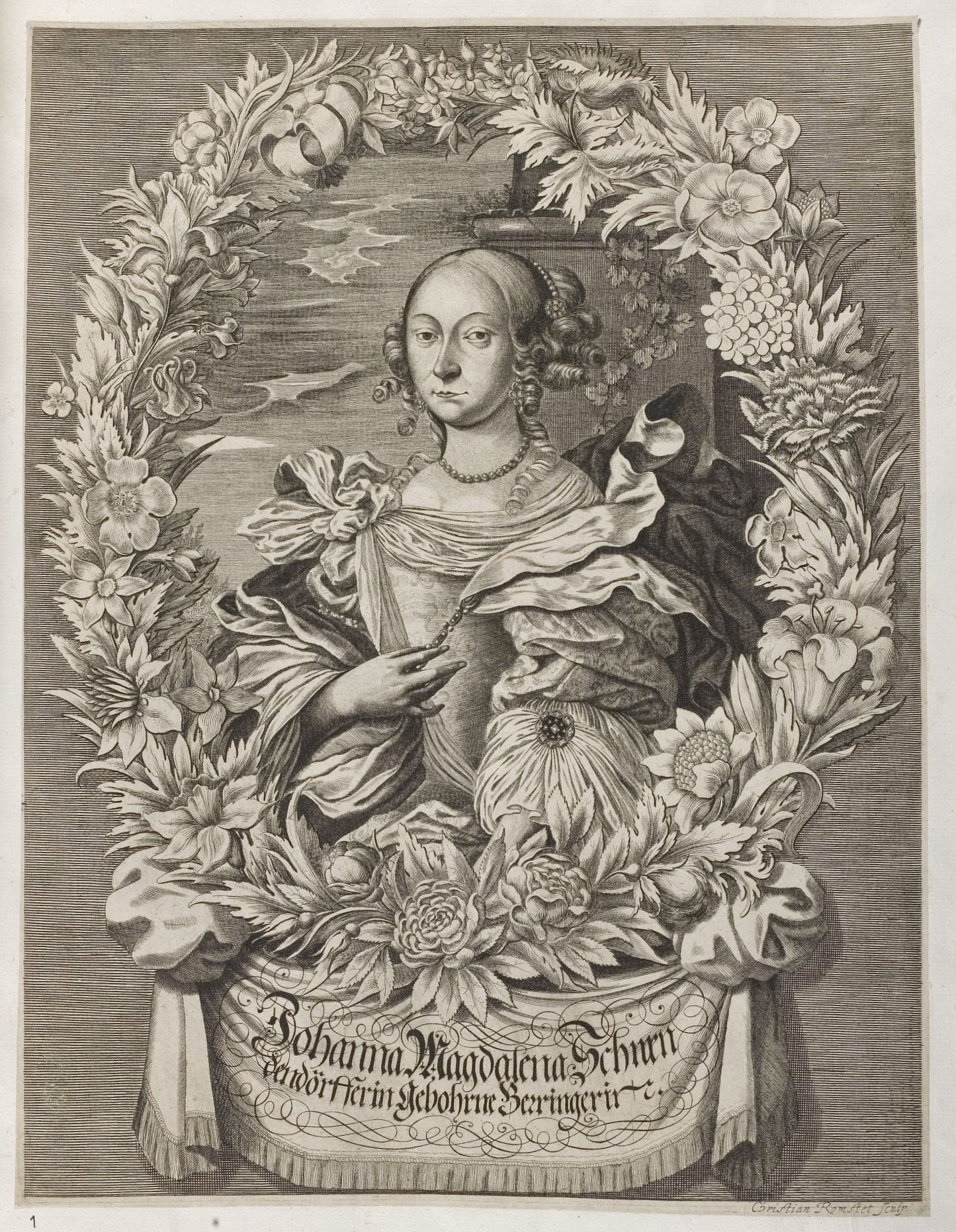 Grafik aus dem Klebeband Nr. 3 der Fürstlich Waldeckschen Hofbibliothek Arolsen Motiv: Johanna Magdalena Schwendendörffer, geb. Beringer (* 1656 in Dresden, † 1679 in Leipzig) GND: 1023547058